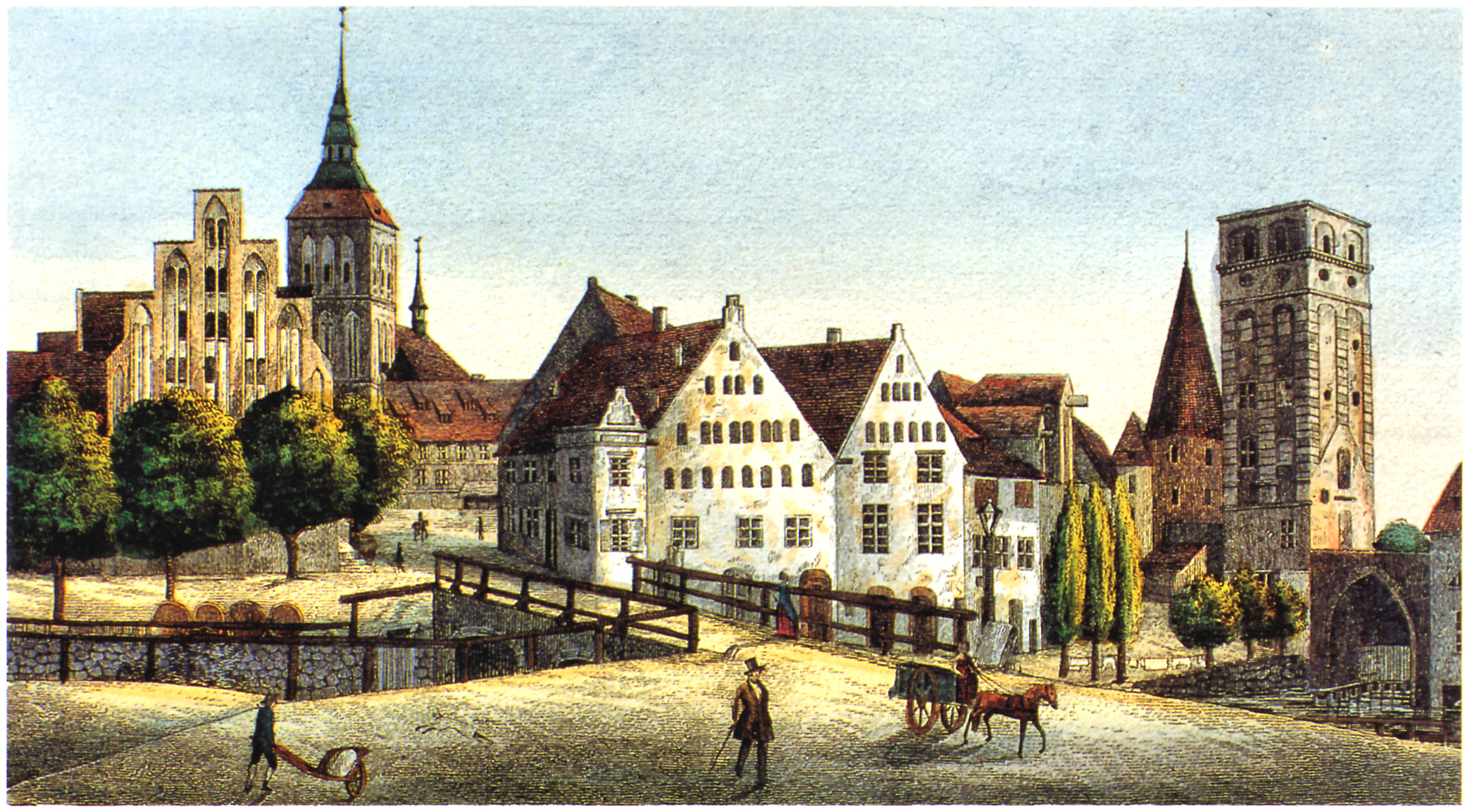 Rostock vom Beginenberg